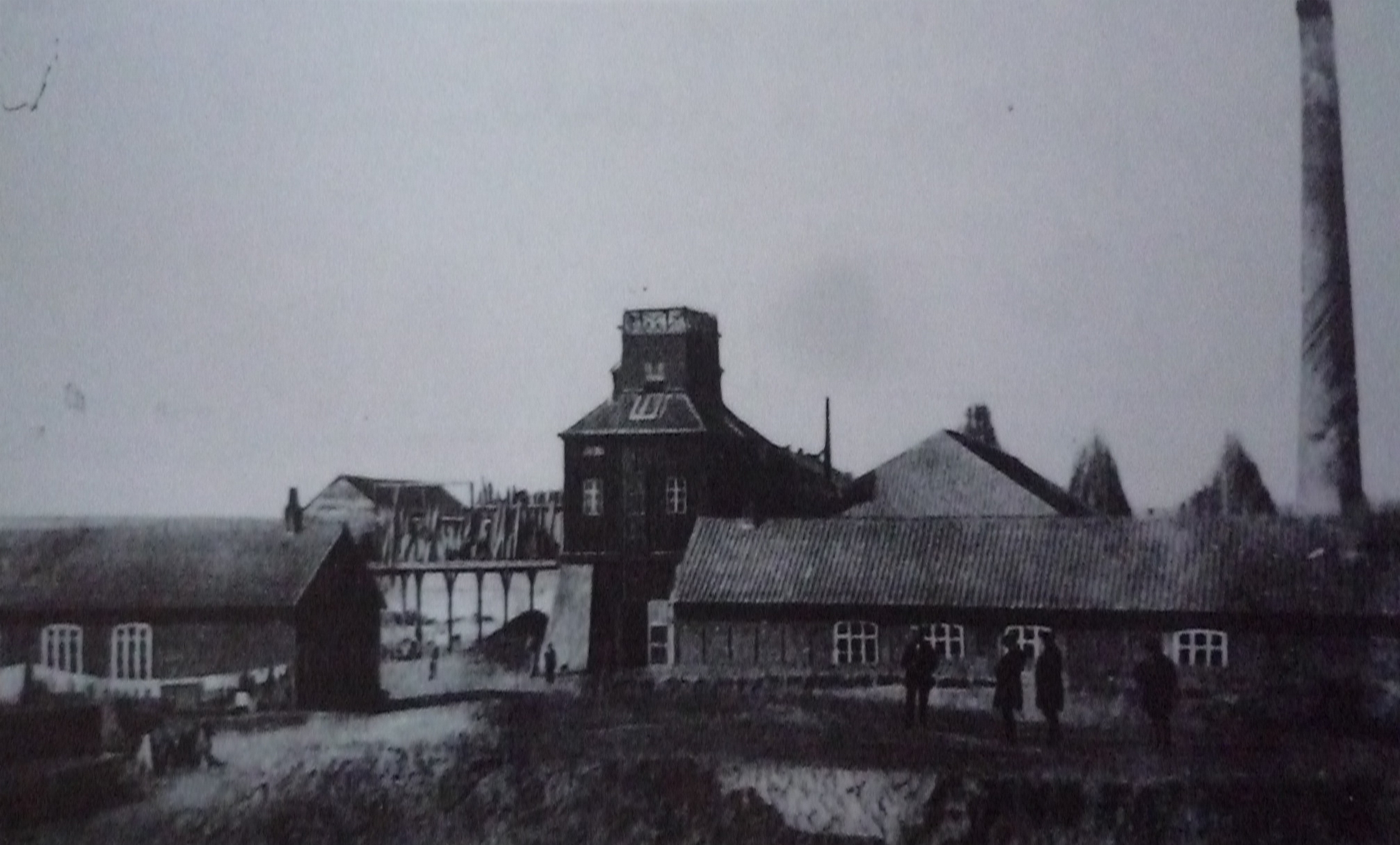 La fosse no 2 dite Saint-Émile de la Compagnie des mines de Marles était un charbonnage du bassin minier du Nord-Pas-de-Calais constitué d'un seul puits situé à Marles-les-Mines, Pas-de-Calais, Nord-Pas-de-Calais, France. L'avaleresse no 1 est localisée sur le site. Le chevalement de la fosse no 2 avec les parties anciennes du bâtiment de la machine d'extraction sont inscrits aux monuments historiques le 6 mai 1992. La fosse est également inscrite sur la liste du patrimoine mondial par l'Unesco le 30 juin 2012 et y constitue le site no 101.